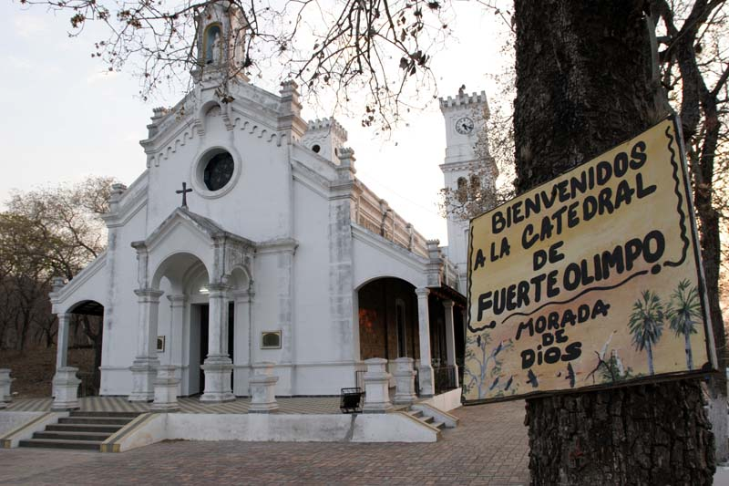 Cathedral de Fuerte Olimpo